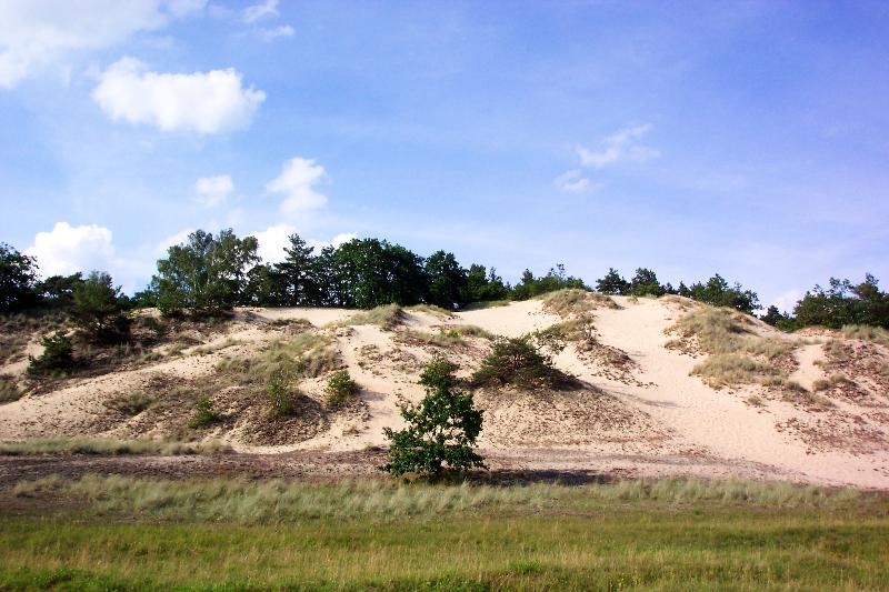 Binnenlanddünen an der Elbe bei Dömitz